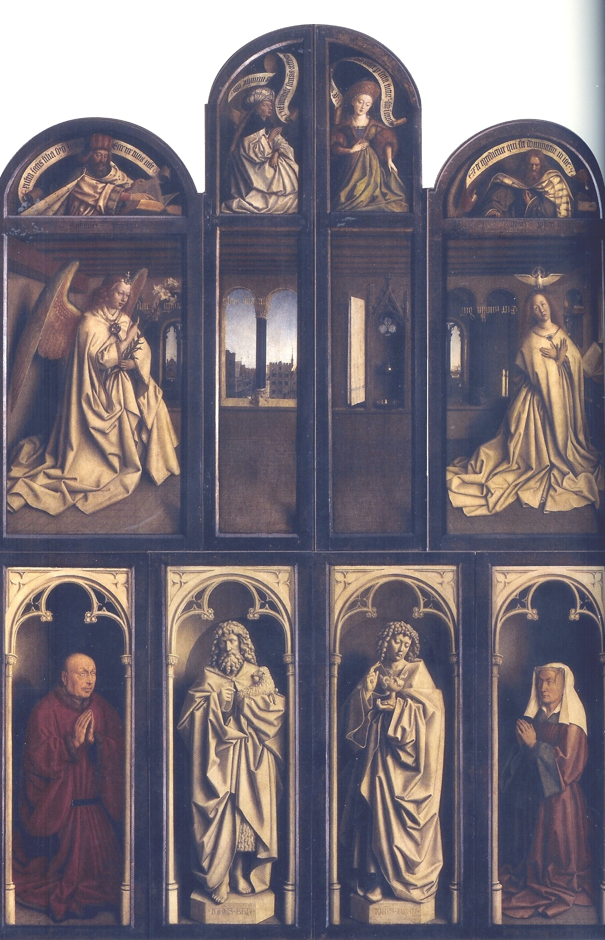 Back panels